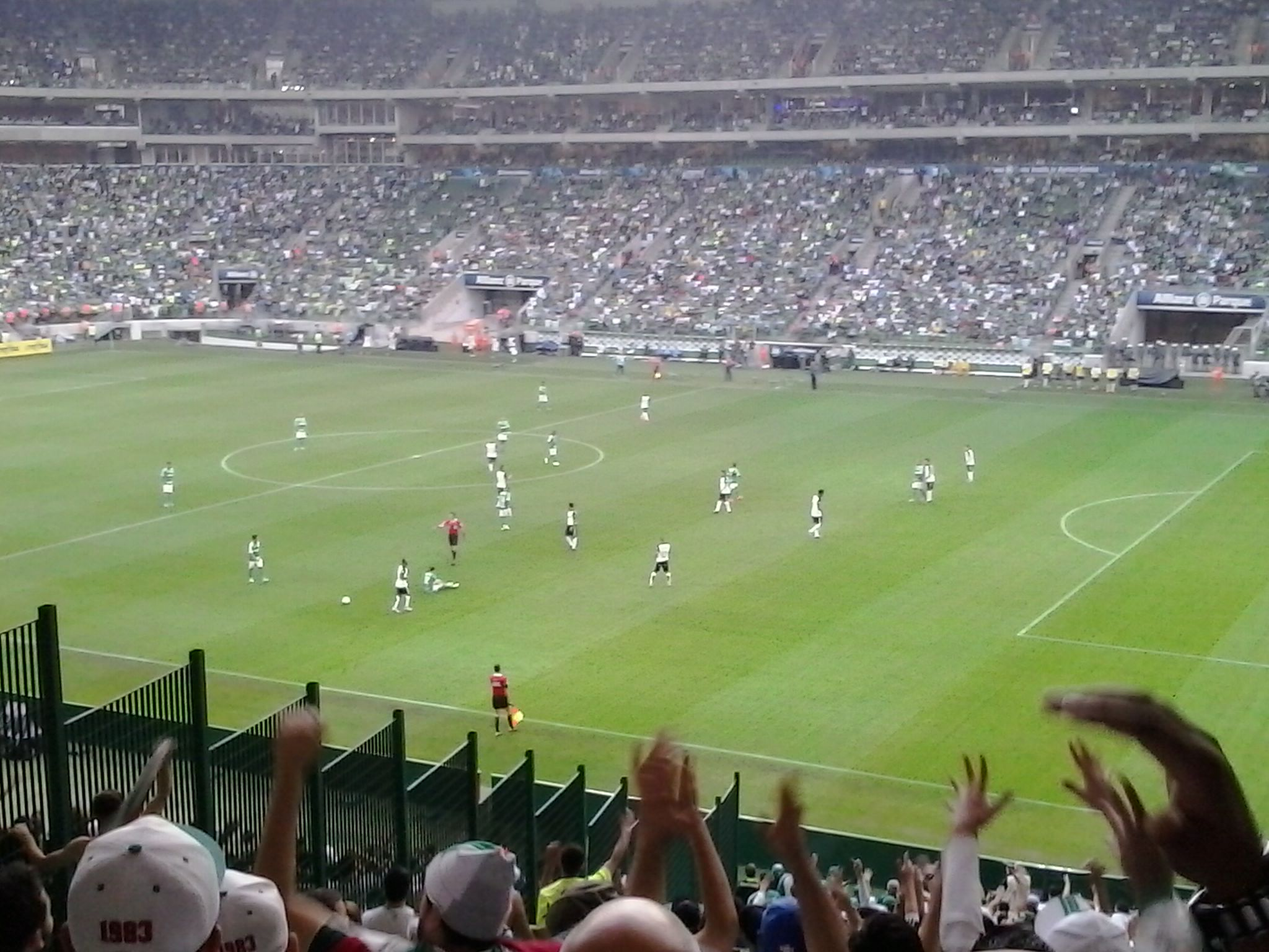 Equipes do Palmeiras e do Corinthians em partida disputada no Allianz Parque no Campeonato Brasileiro de 2015